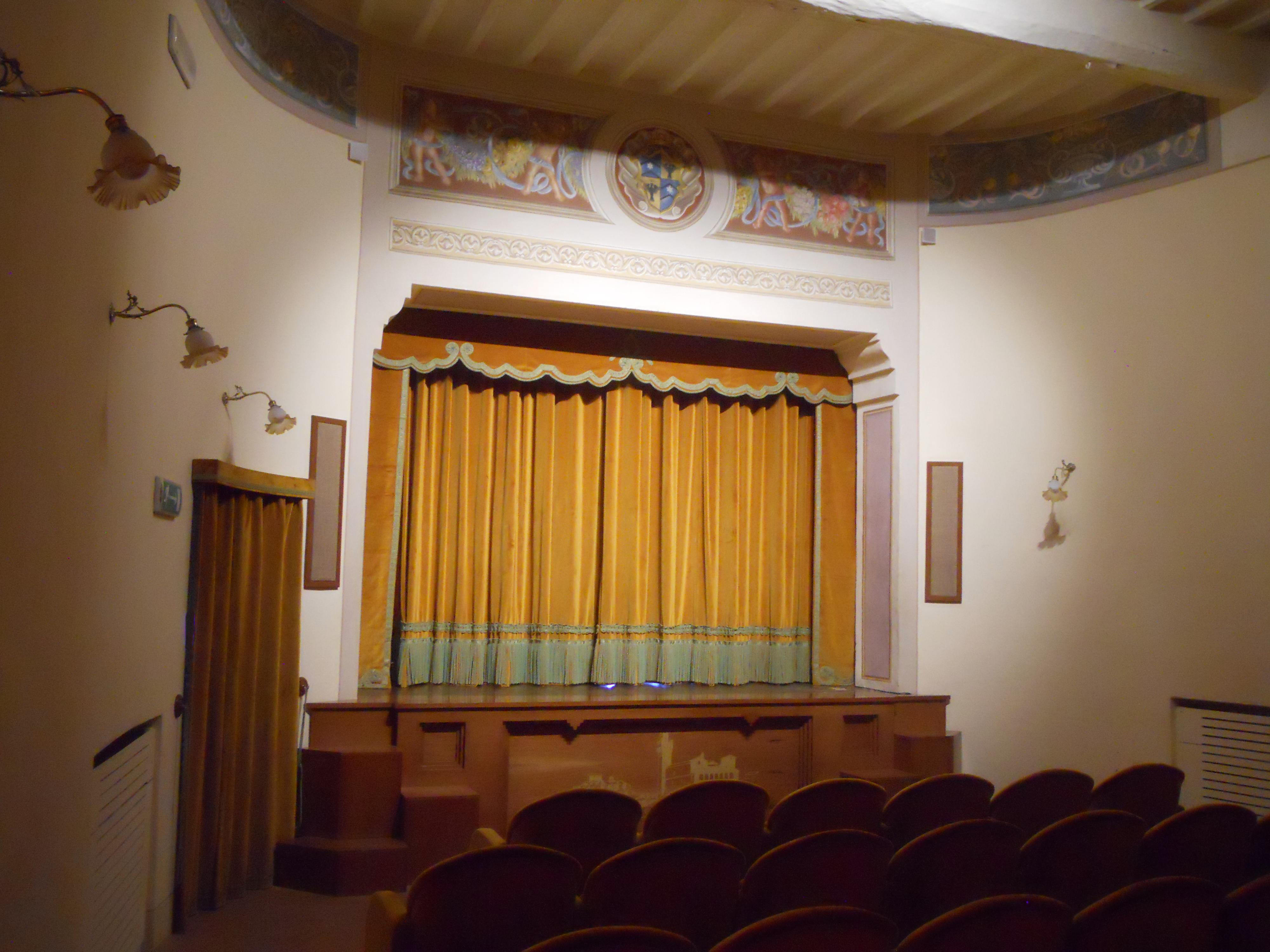 Interno della sala del Teatro della grancia con in primo piano gli apliques